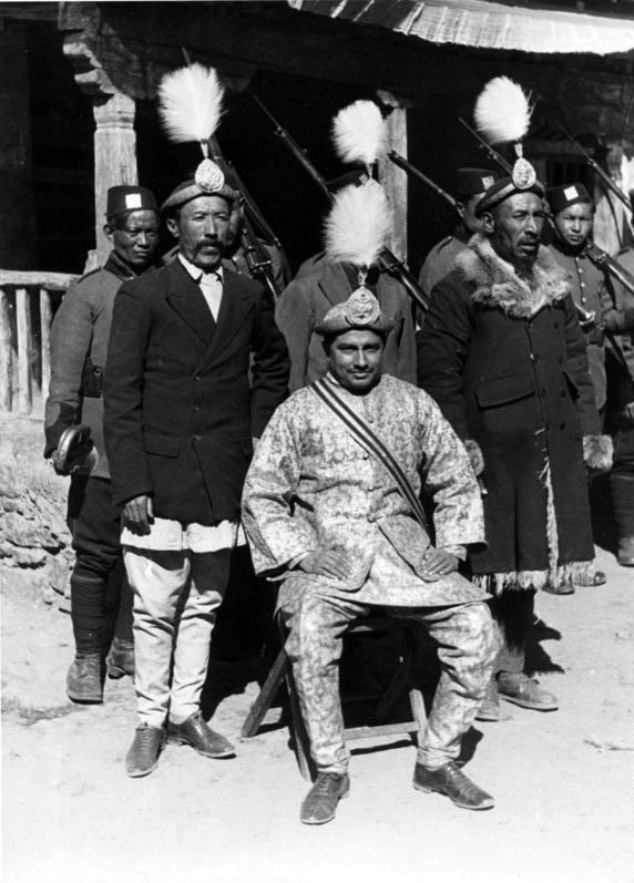 Lhasa, der Gesandte Nepals mit seinen Sekretären